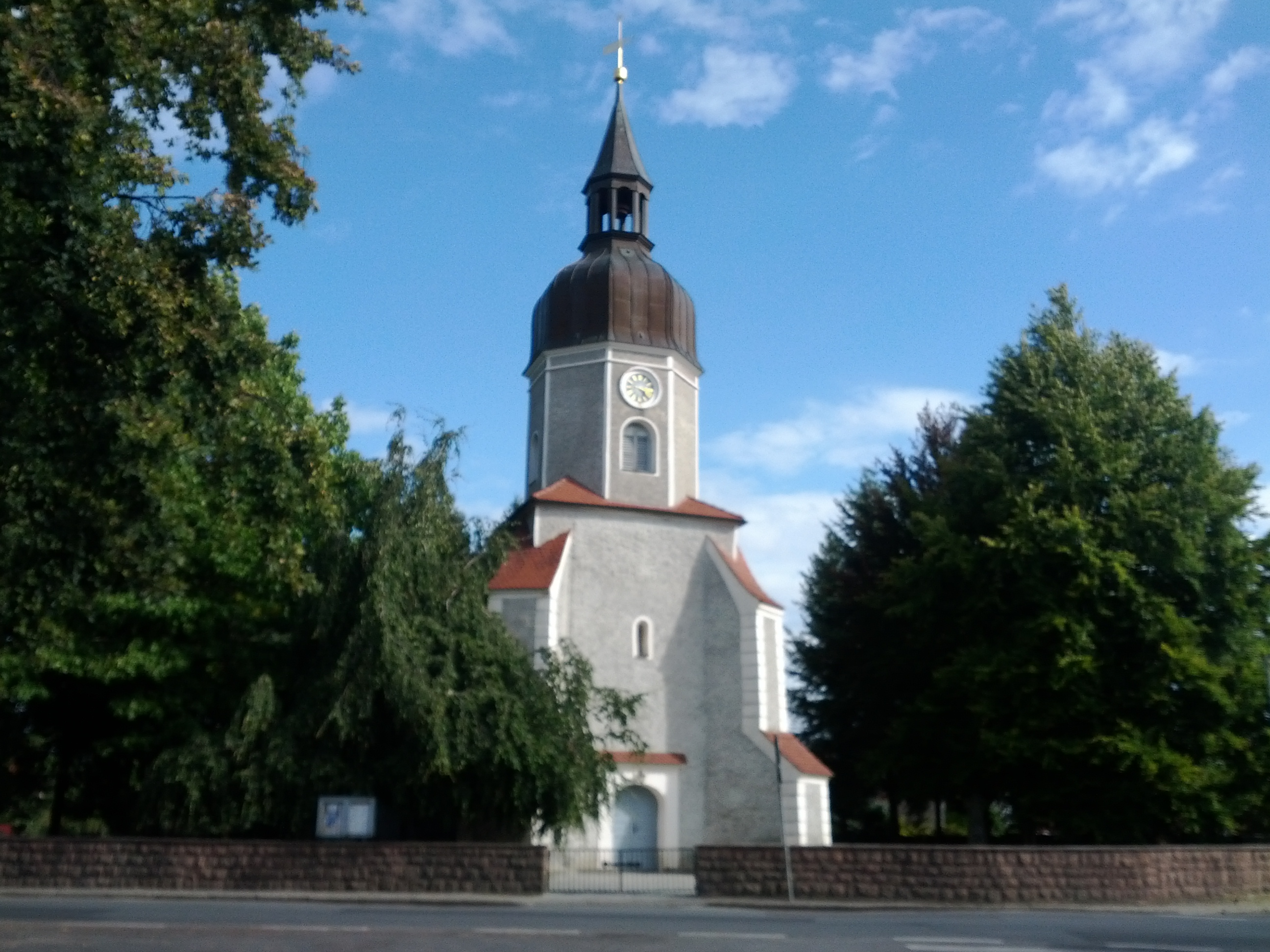 Denkmalgeschütztes Kirche in Hohenbocka